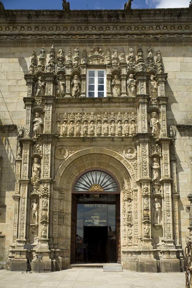 Cultural Heritage Spain RI-51-0000543